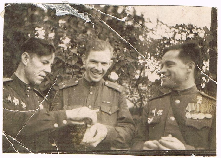 Герои Советского Союза Л. Чугуевский (слева) и В. Панкратов (справа), а также комсорг Кобзев (в центре). 4 июля 1945, Тапиау (Гвардейск).